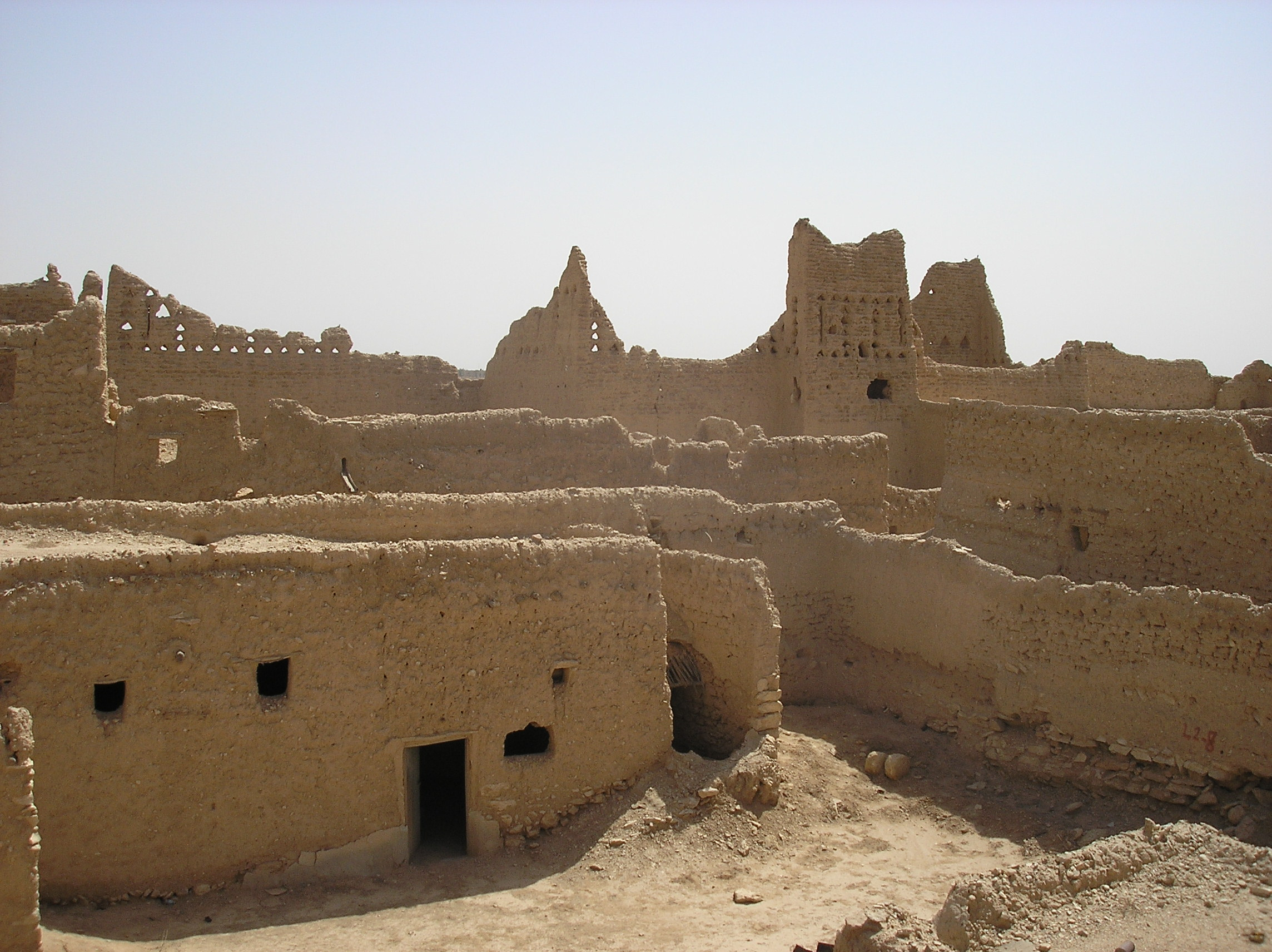 Dir'iyyah